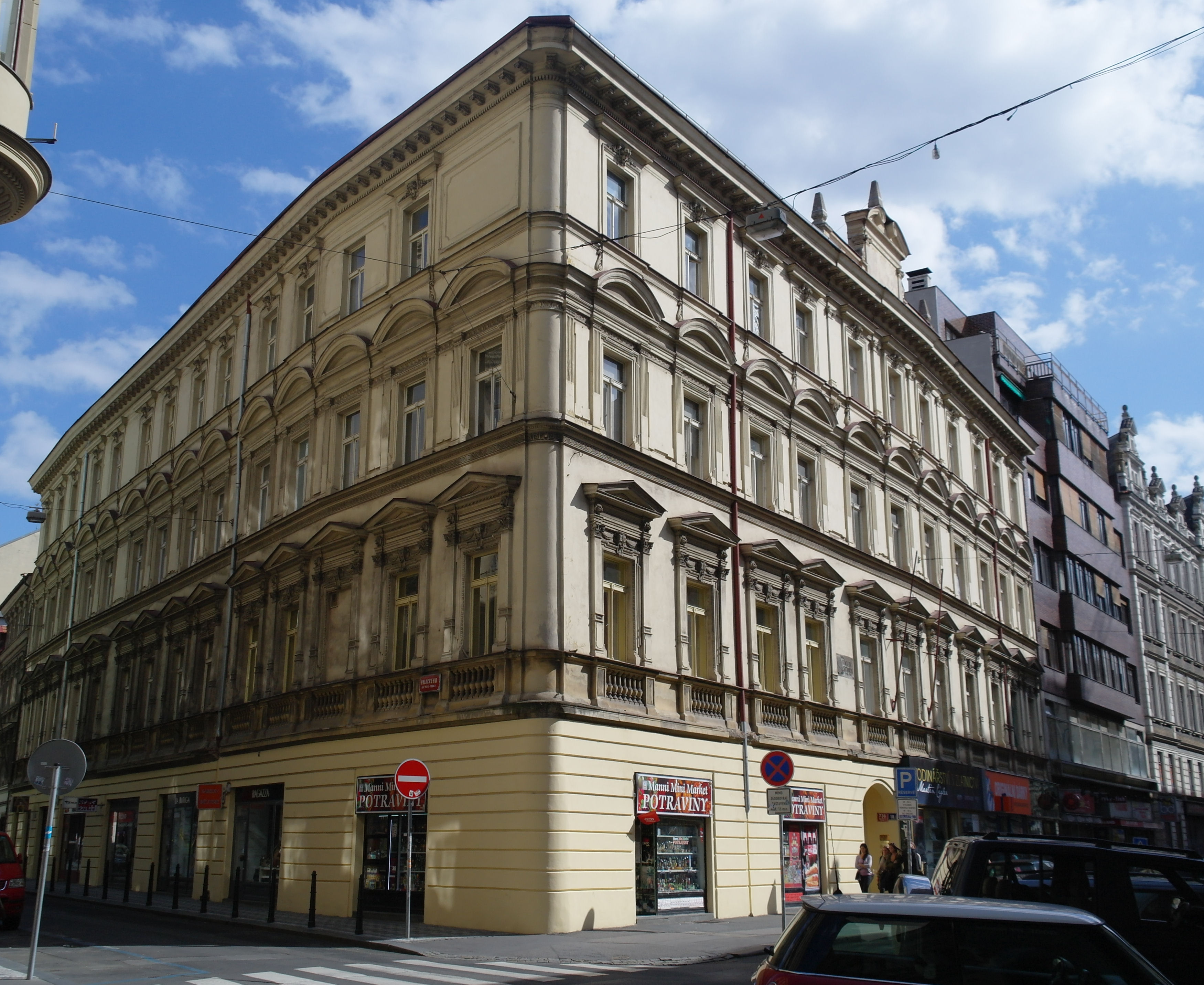 Měšťanský dům č.p. 738 v Praze na Novém Městě